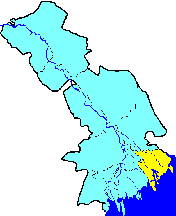 Володарский район на карте Астраханской области